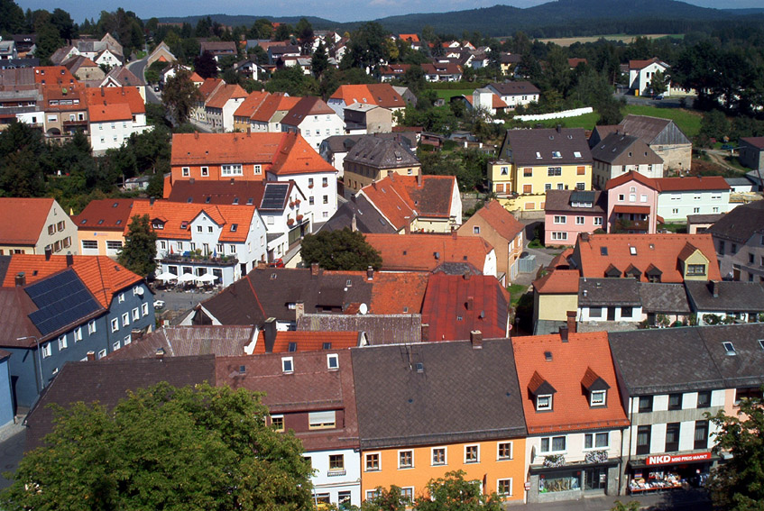 Floß(Gemeinde) - Deutschland/BY